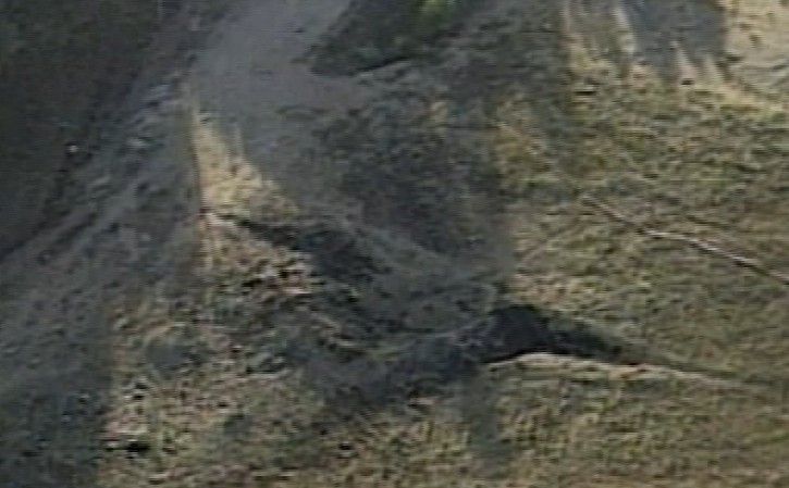 United States v. Zacarias Moussaoui Criminal No. 01-455-A Prosecution Trial Exhibits Exhibit Number P200057 Description - Photograph of the scene in Somerset County, Pennsylvania, where Flight 93 crashed